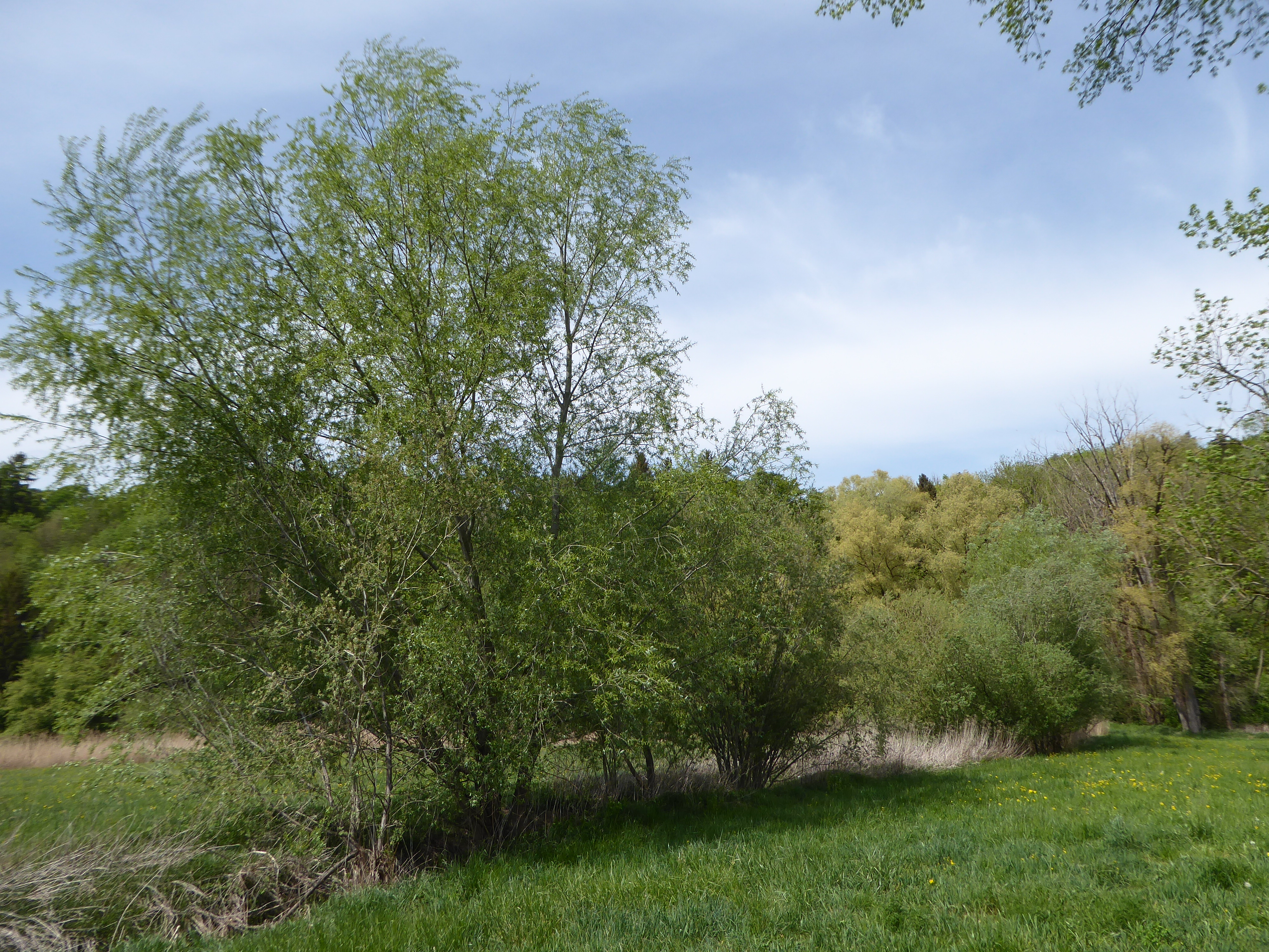 Seebach bei der Mündung im Thurvorland